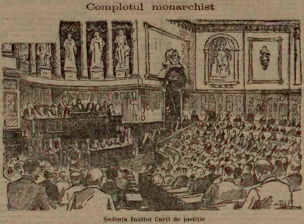 Imagine de la o şedinţă a Înaltei Curţi de Justiţie apărută în ziarul Adevărul în 1899